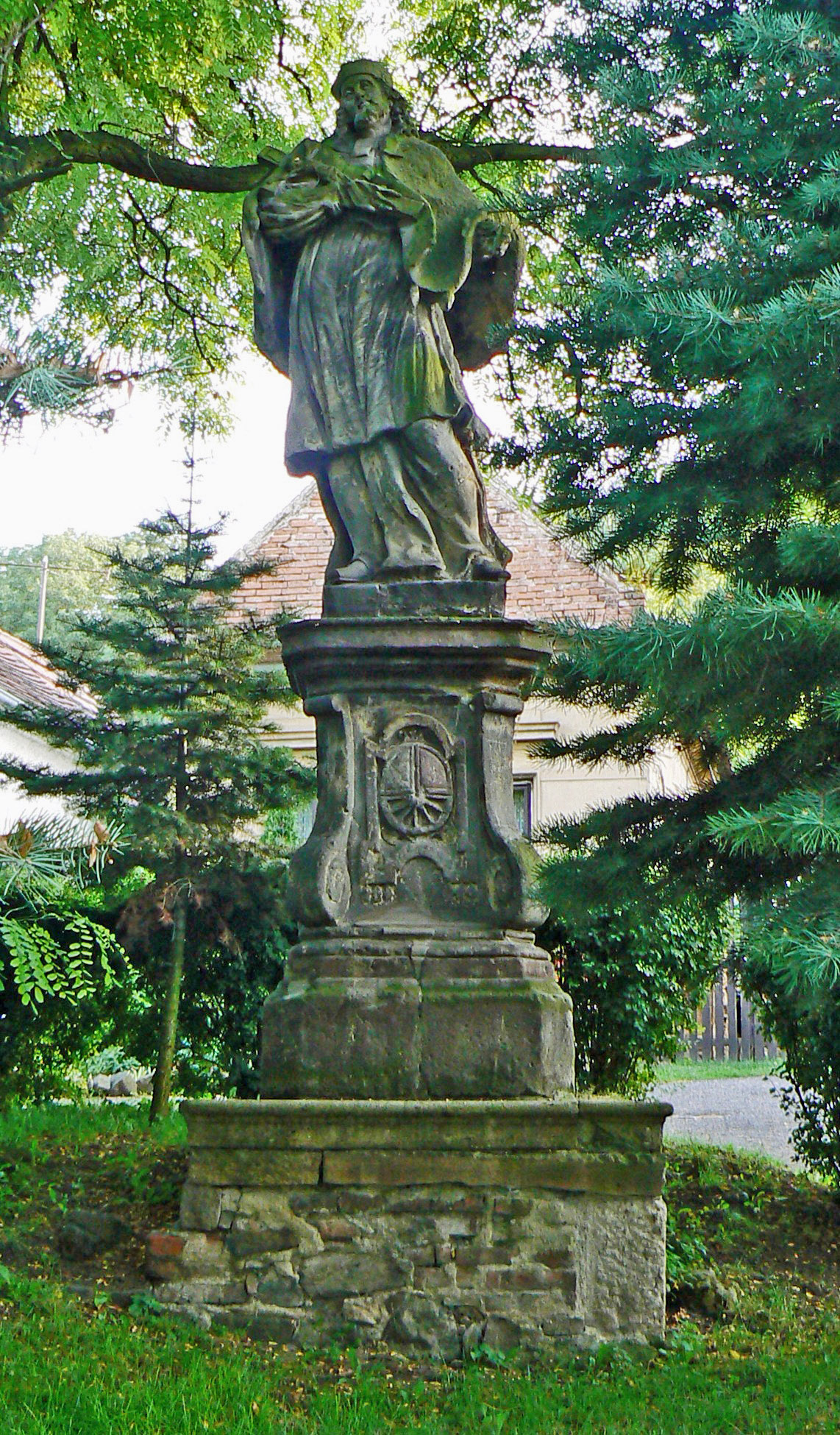 Socha sv. Jana Nepomuckého (Bělušice), JZ část návsi, Bělušice